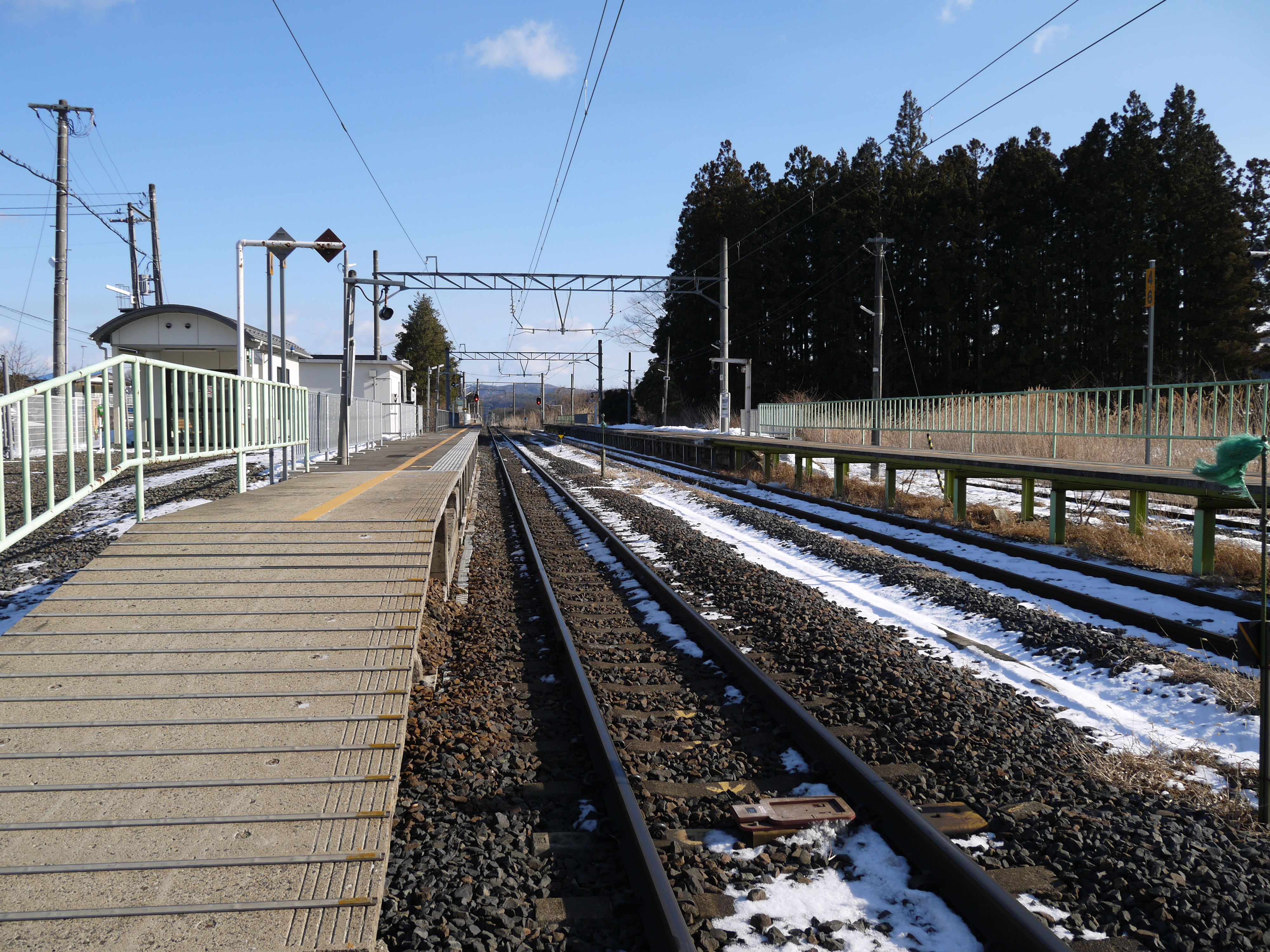 陸前白沢駅構内